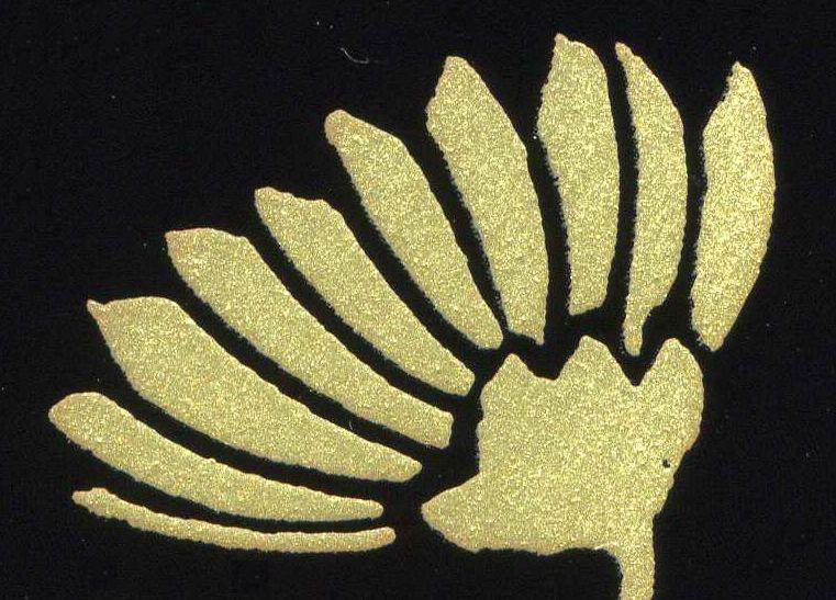 蒔絵（Image:Makie.jpgの拡大図）